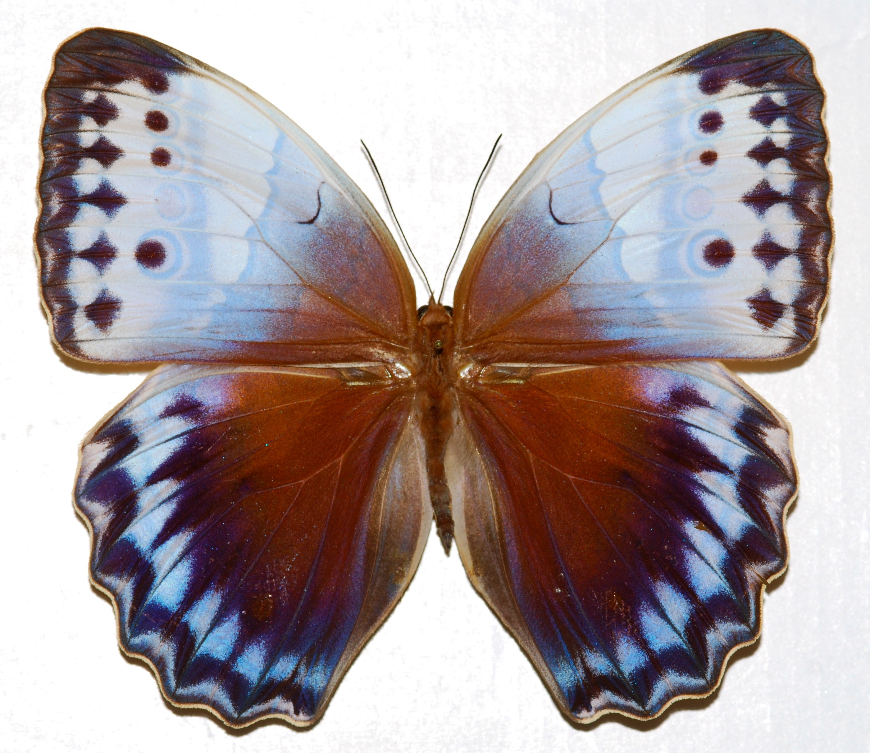 Khasi Hills, Assam, INDIA